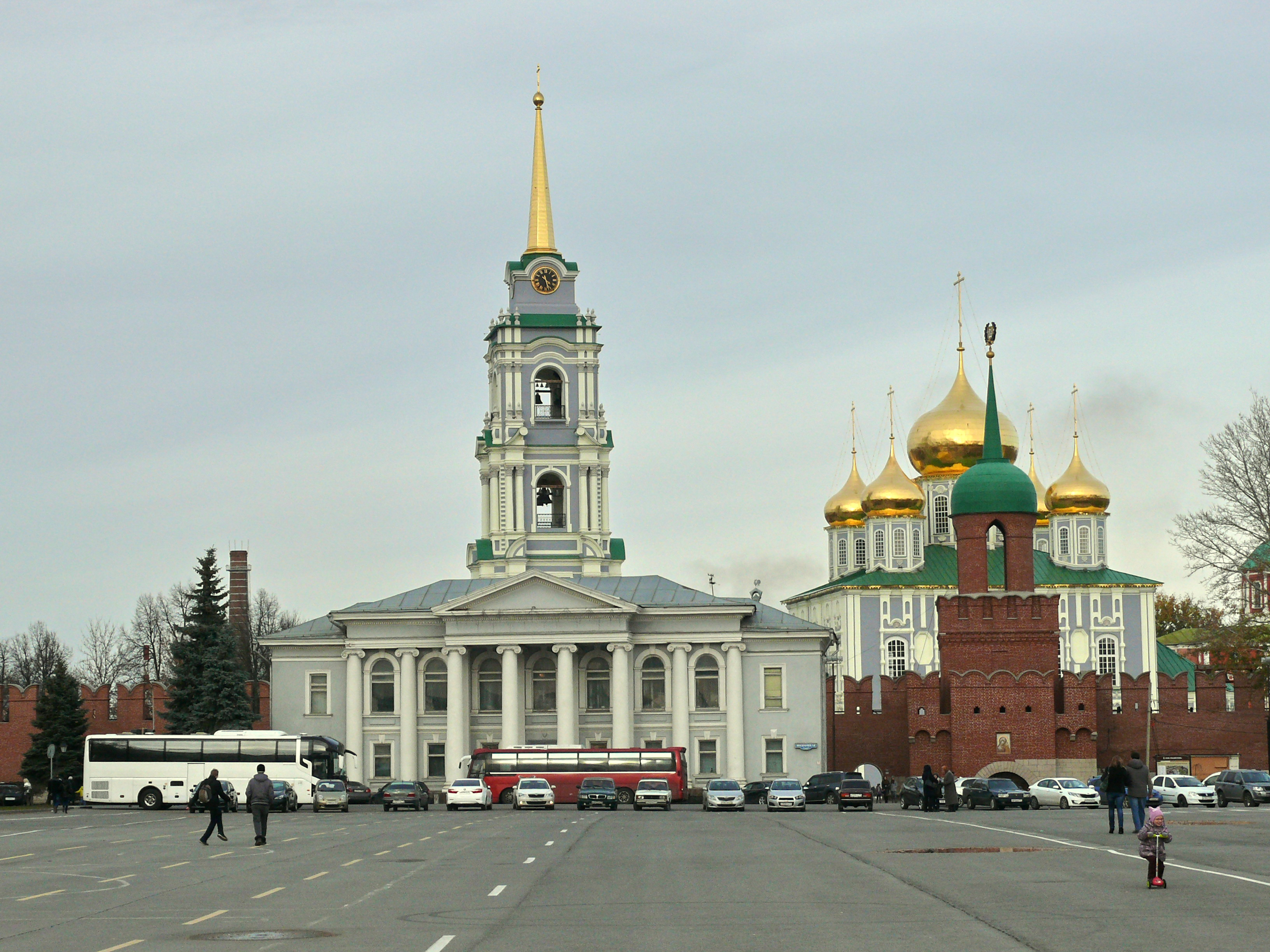 Стены и башни (Тульская область, Тула, Кремль)